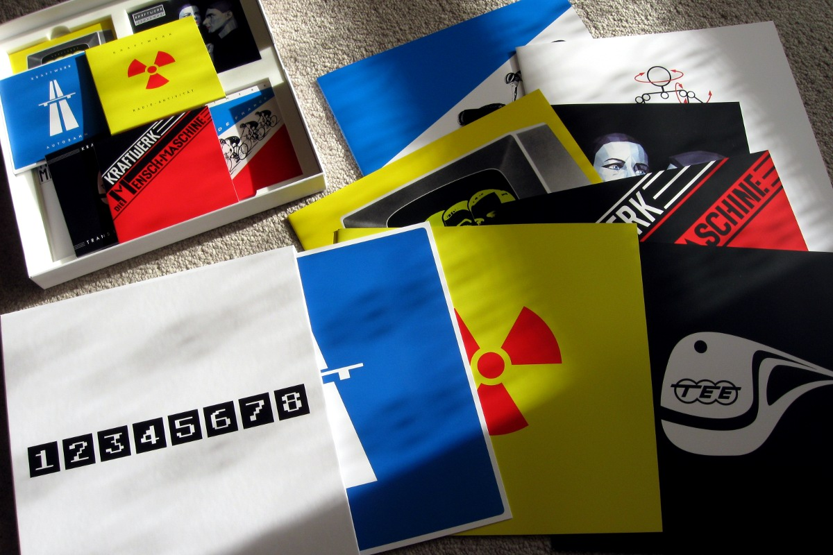 Der Katalog, Kraftwerk.